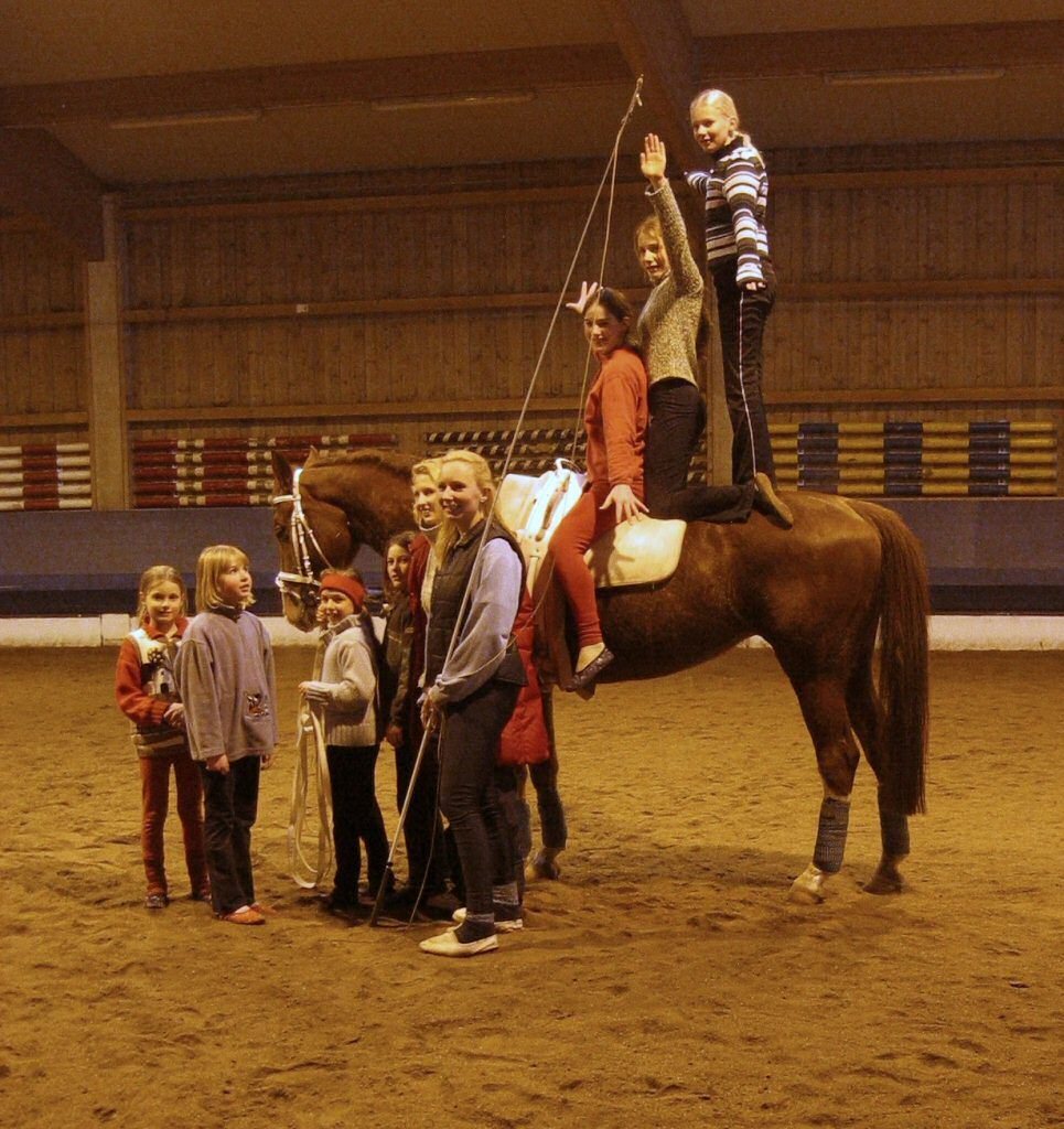 Kinder beim Voltigieren - Hier in der Reitschule Großhelfendorf bei München